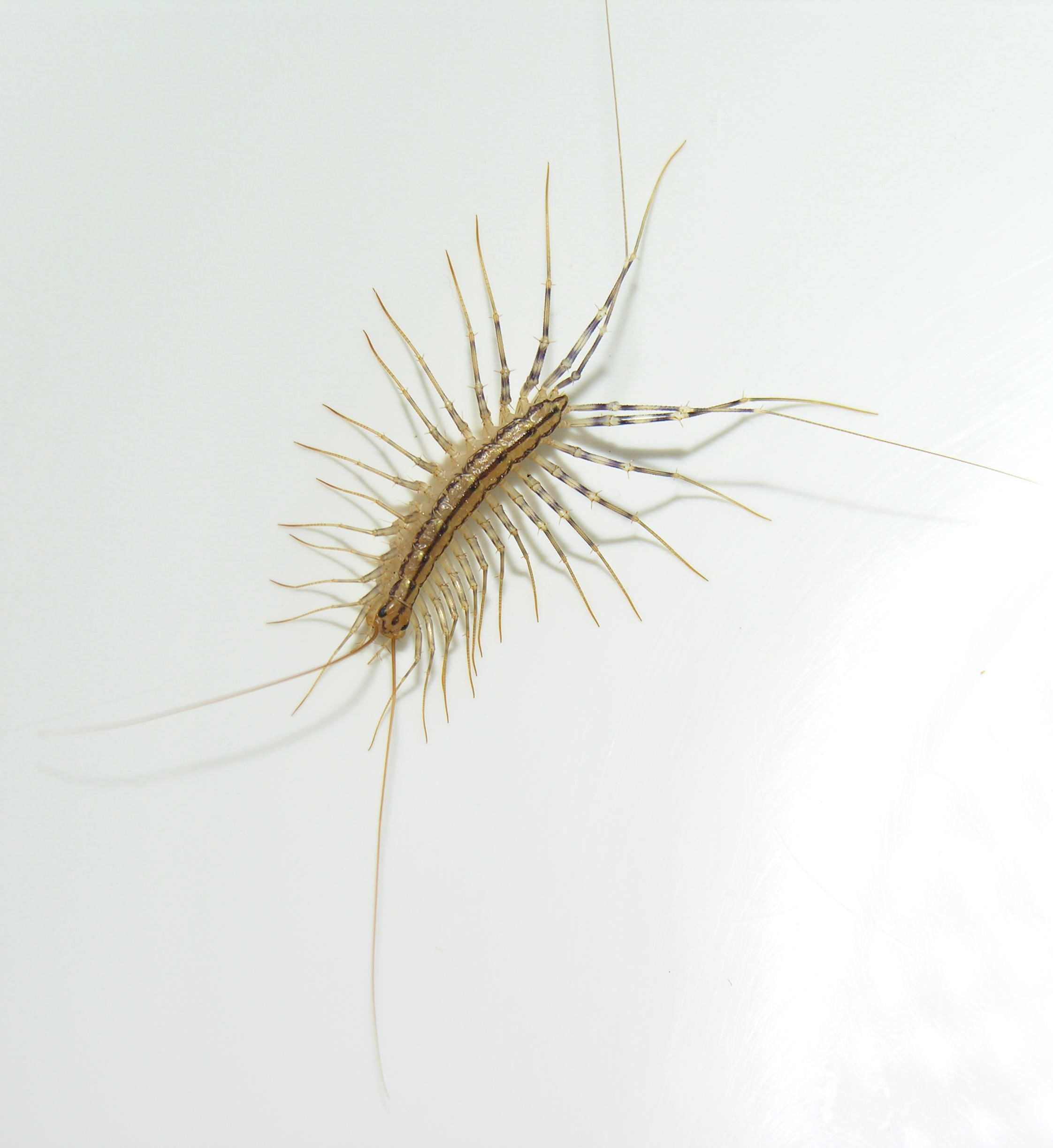 Foto relalizada na fronteira galega con Portugal